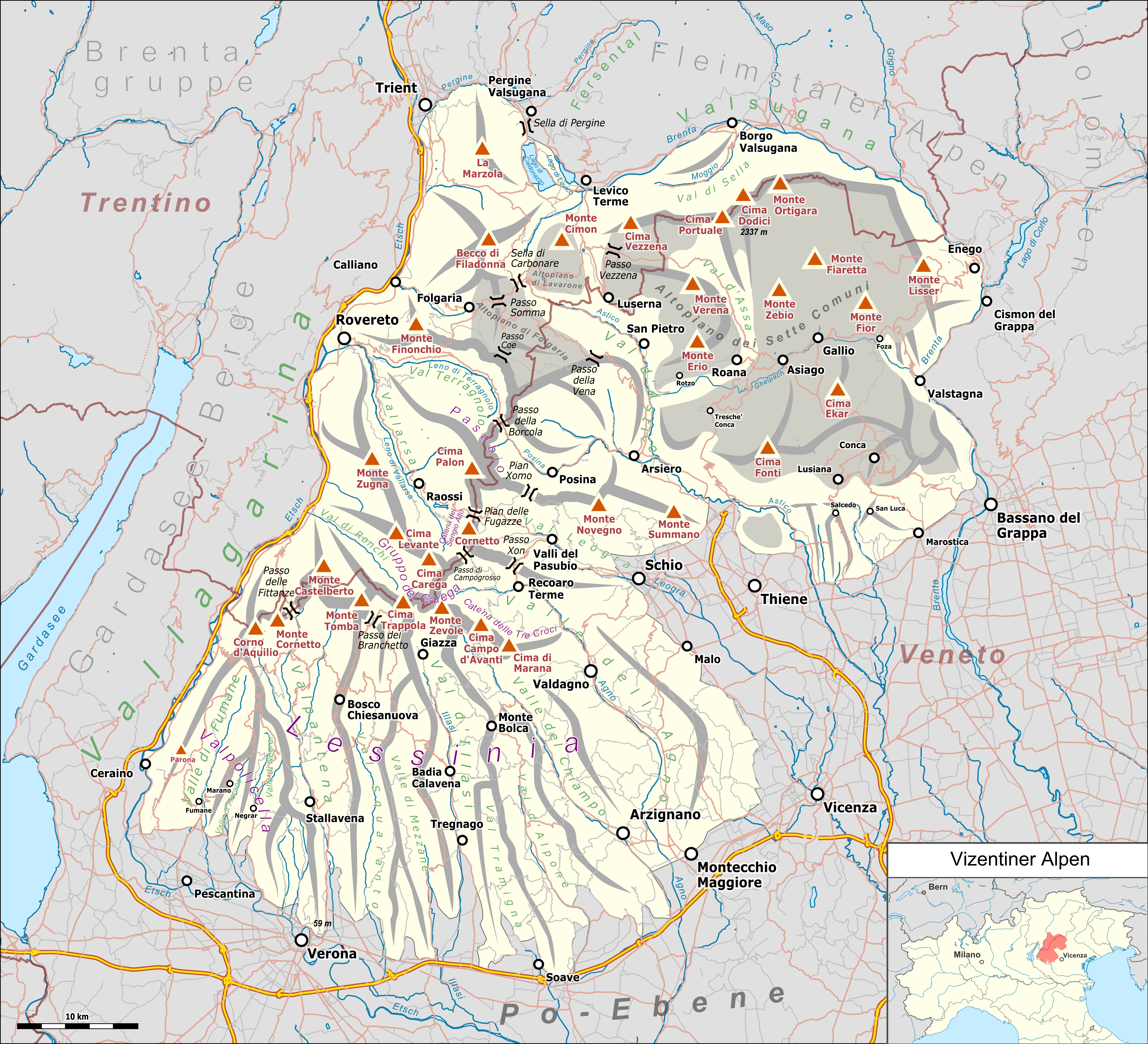 Übersichtskarte der Vizentiner Alpen